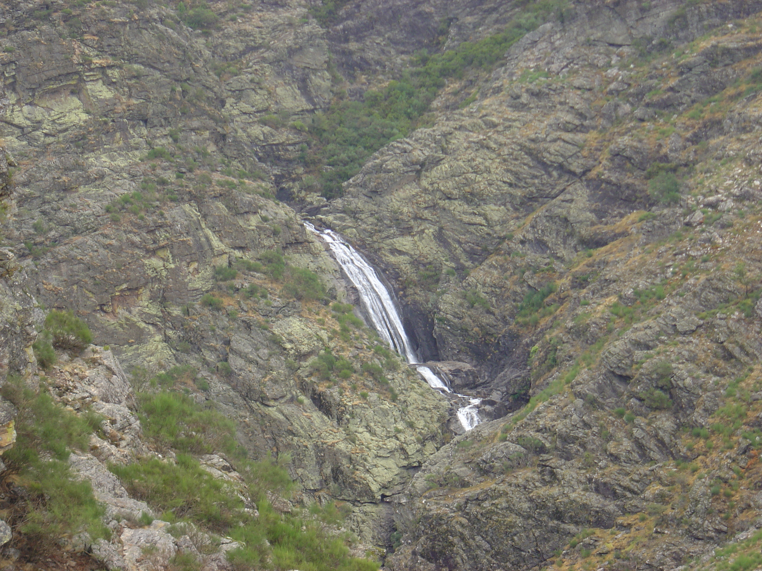 Fisgas de Ermelo waterfall, Portugal